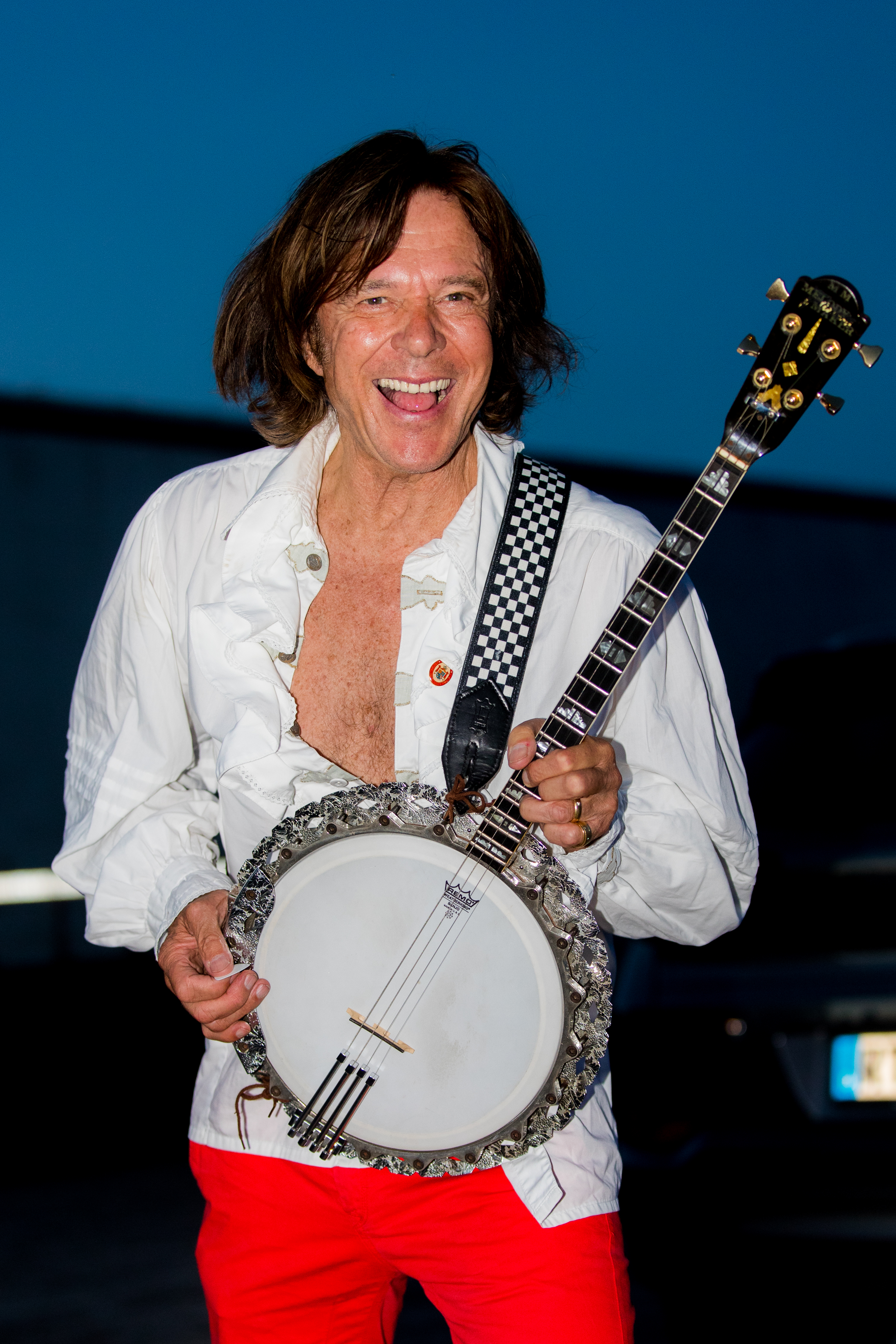 Jürgen Drews during La Ola Mannheim at Maimarktgelände, Mannheim, Baden Württemberg, Germany on 2016-07-09, Photo: Sven Mandel